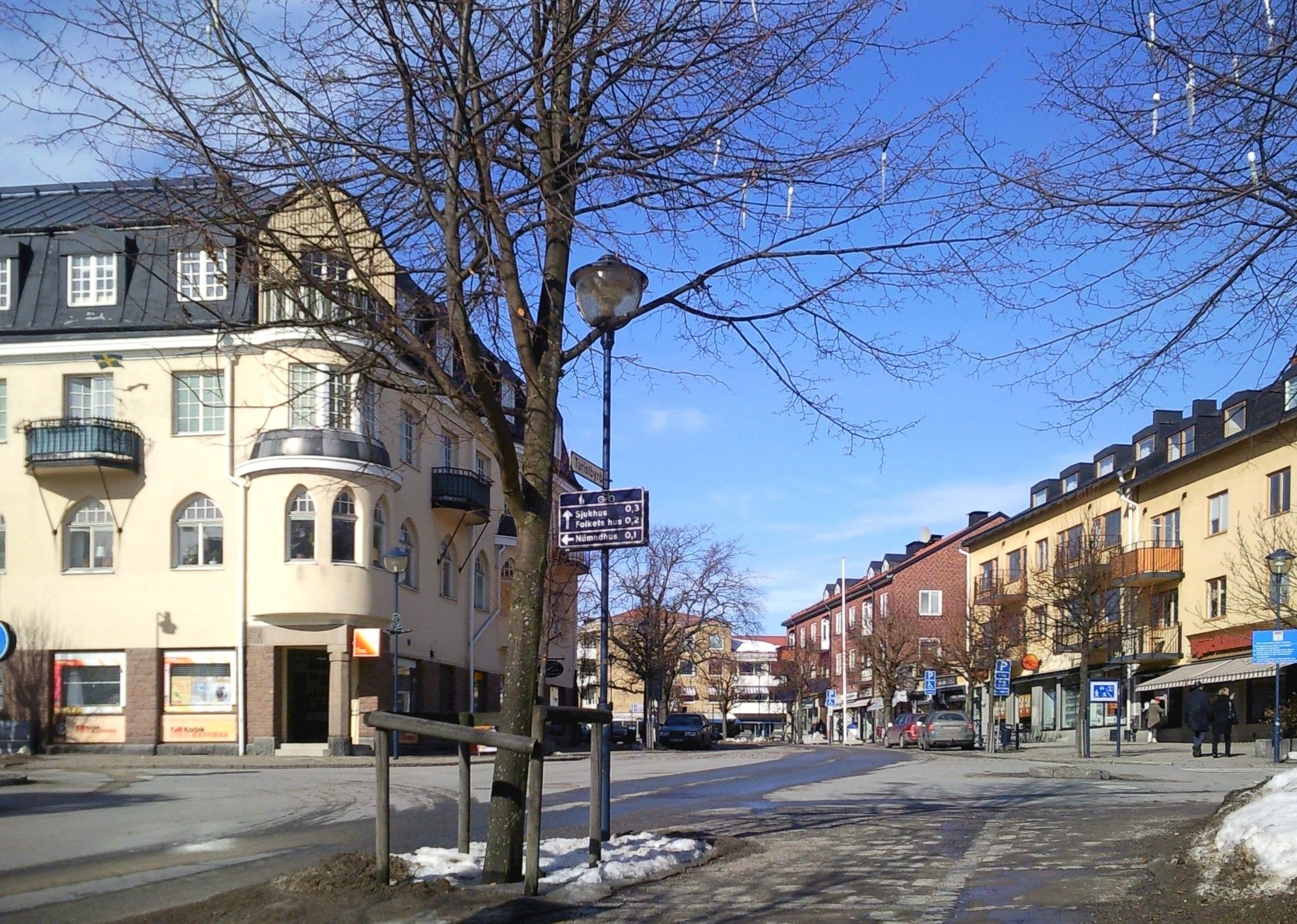 Hamnområdet i Nynäshamn